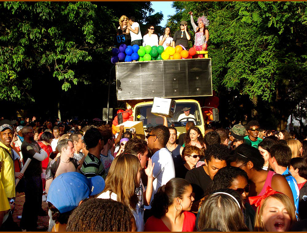 Parada Livre GLBT em Porto Alegre, 2008